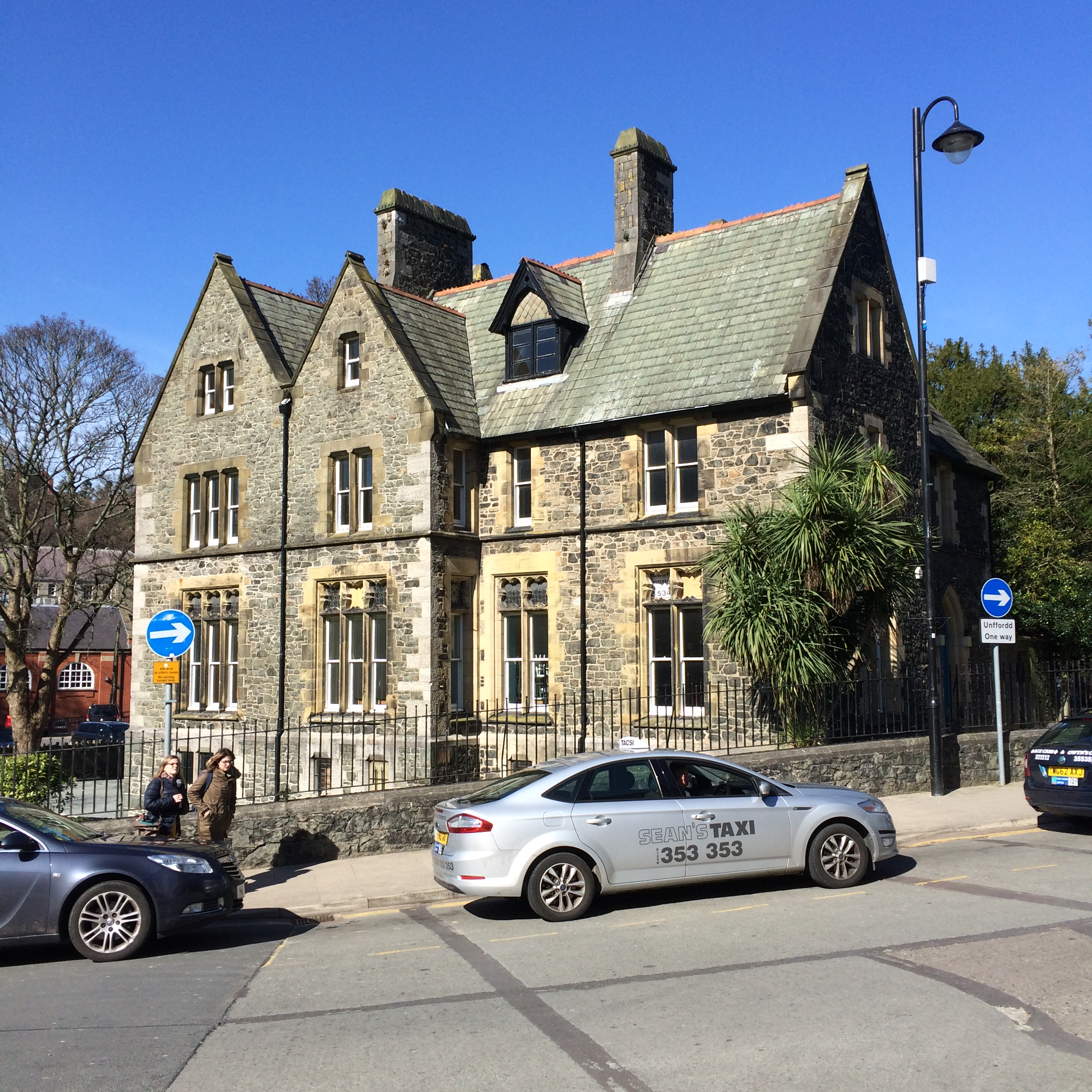 Hen Ganondy Cadeirlan Bangor (Gwynedd). Adeuladwyd yn 1862 (Kennedy ?). Cartref Amgueddfa Bangor 1973-2016.